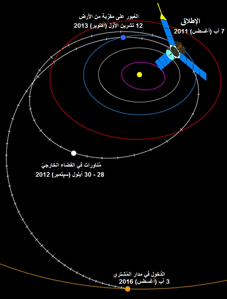 مسار رحلة مسبار جونو الذي يُتوقَّع أن يتَّبعه.